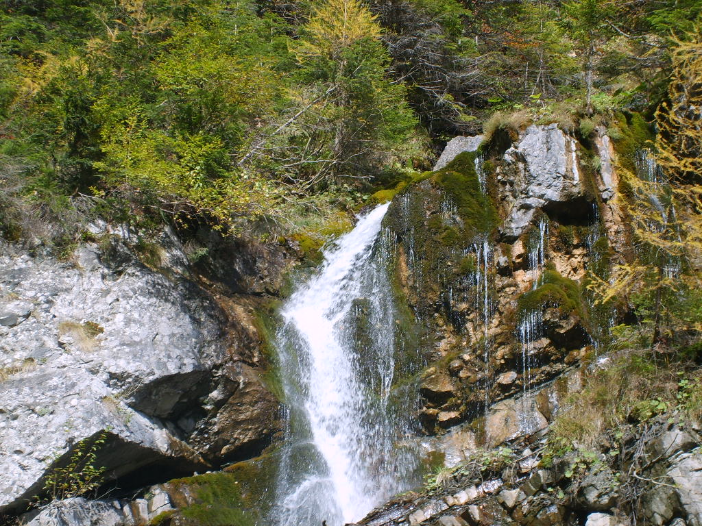 spumoasa